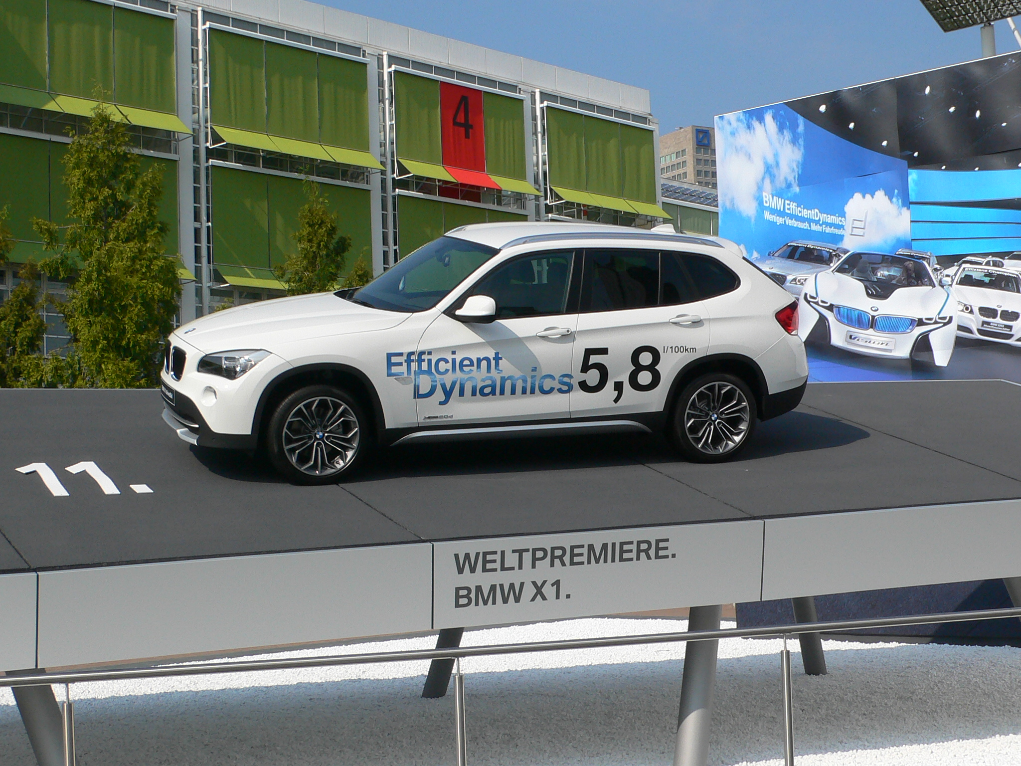 BMW X1 au Salon de Francfort 2009